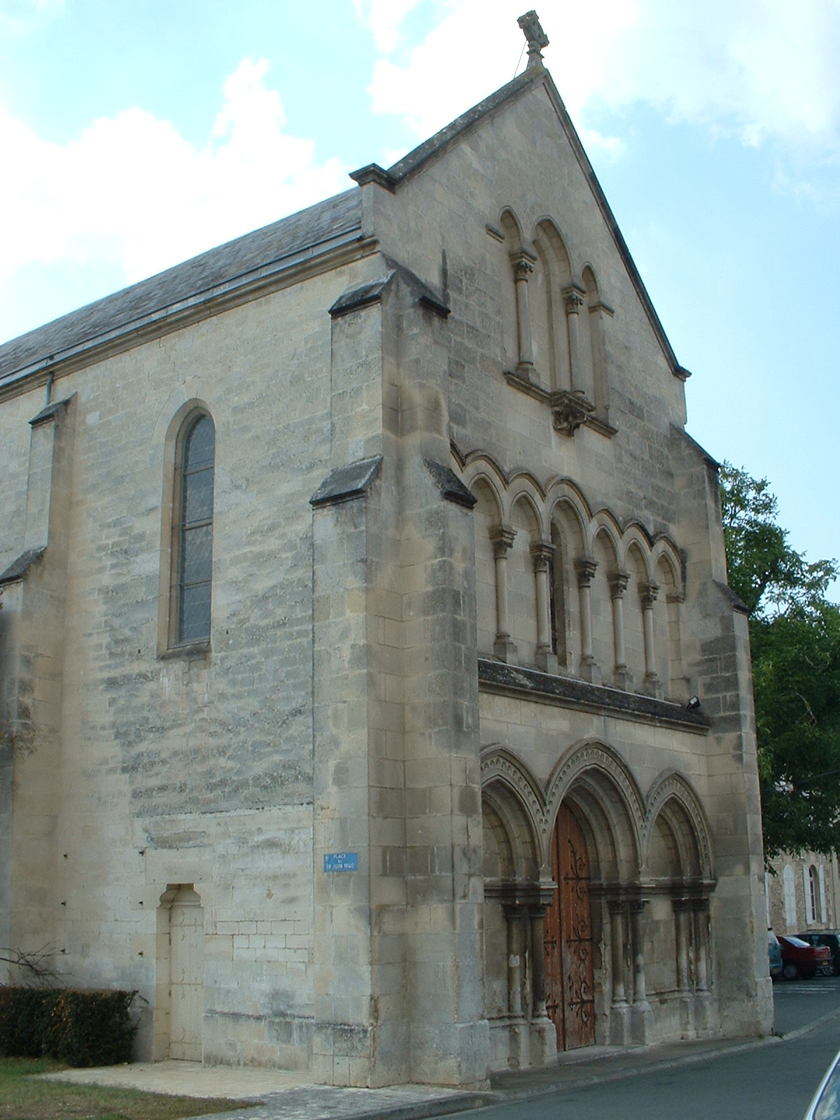 ancienne chapelle bénédictine de St Jean d'Angely